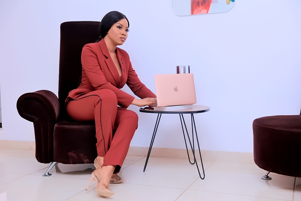 Elena Miro K philanthrope